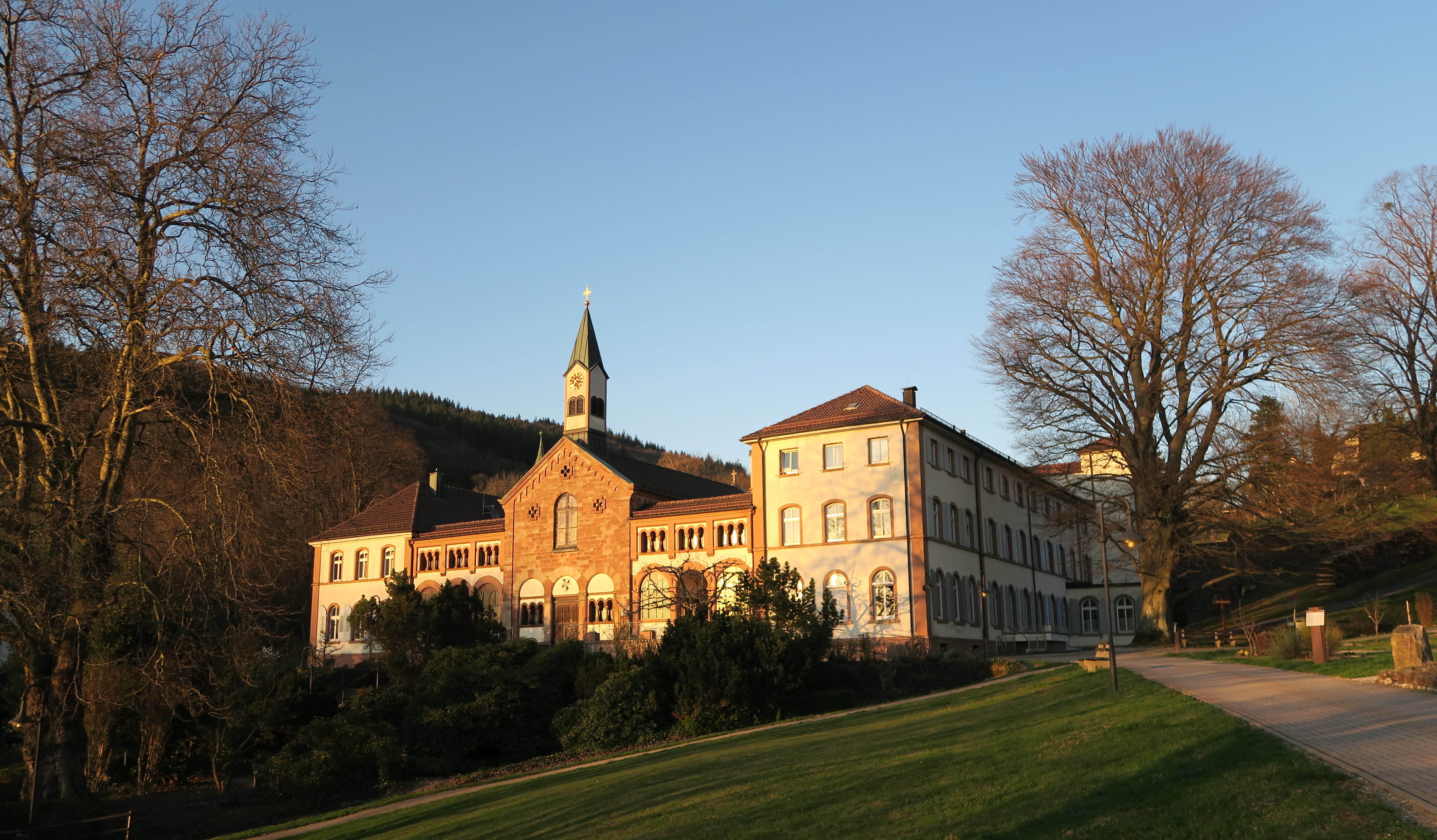 Das Mutterhaus des Klosters Neusatz